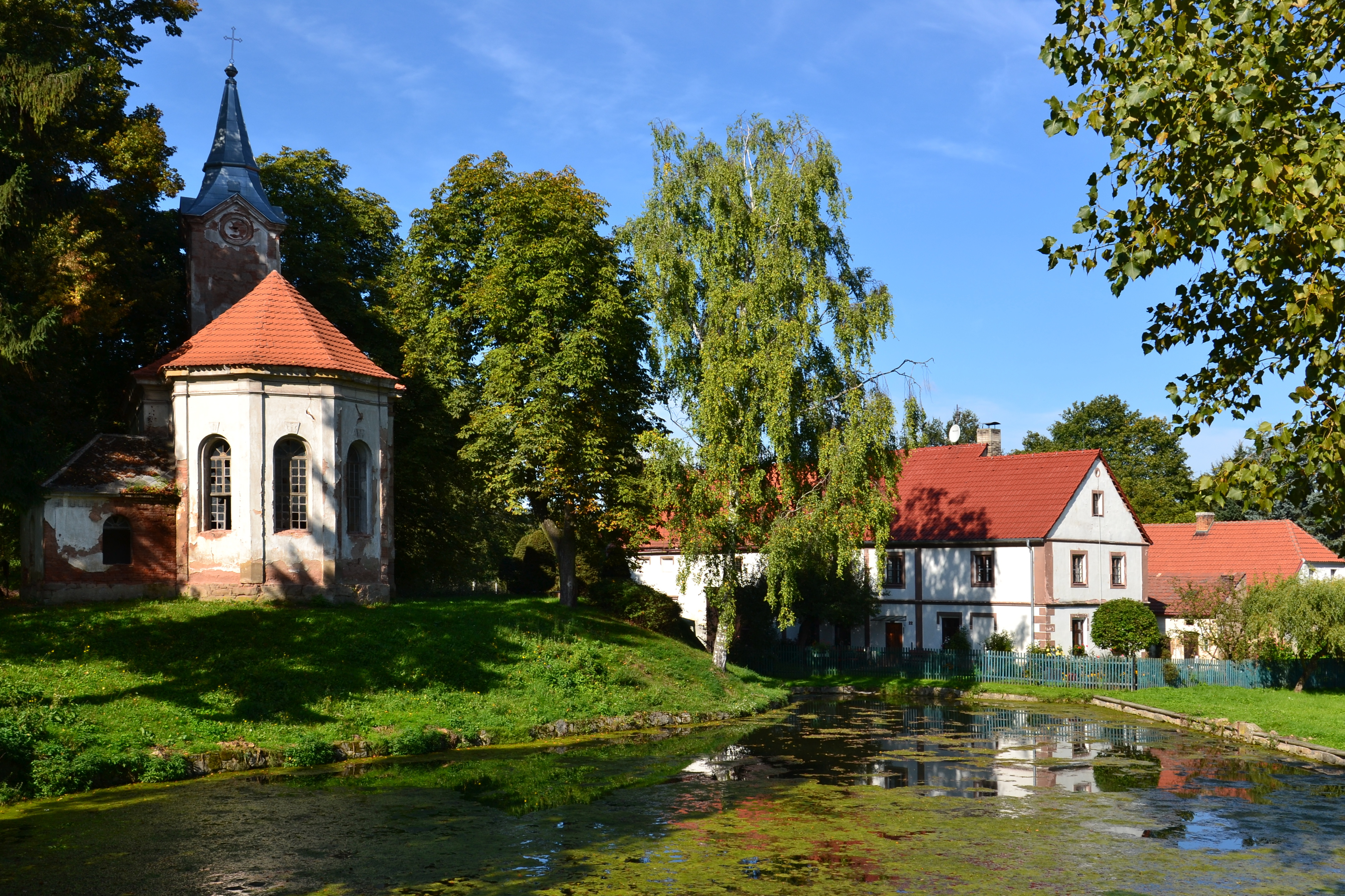 Kostel Povýšení sv. Kříže (Vrbice), Vrbice